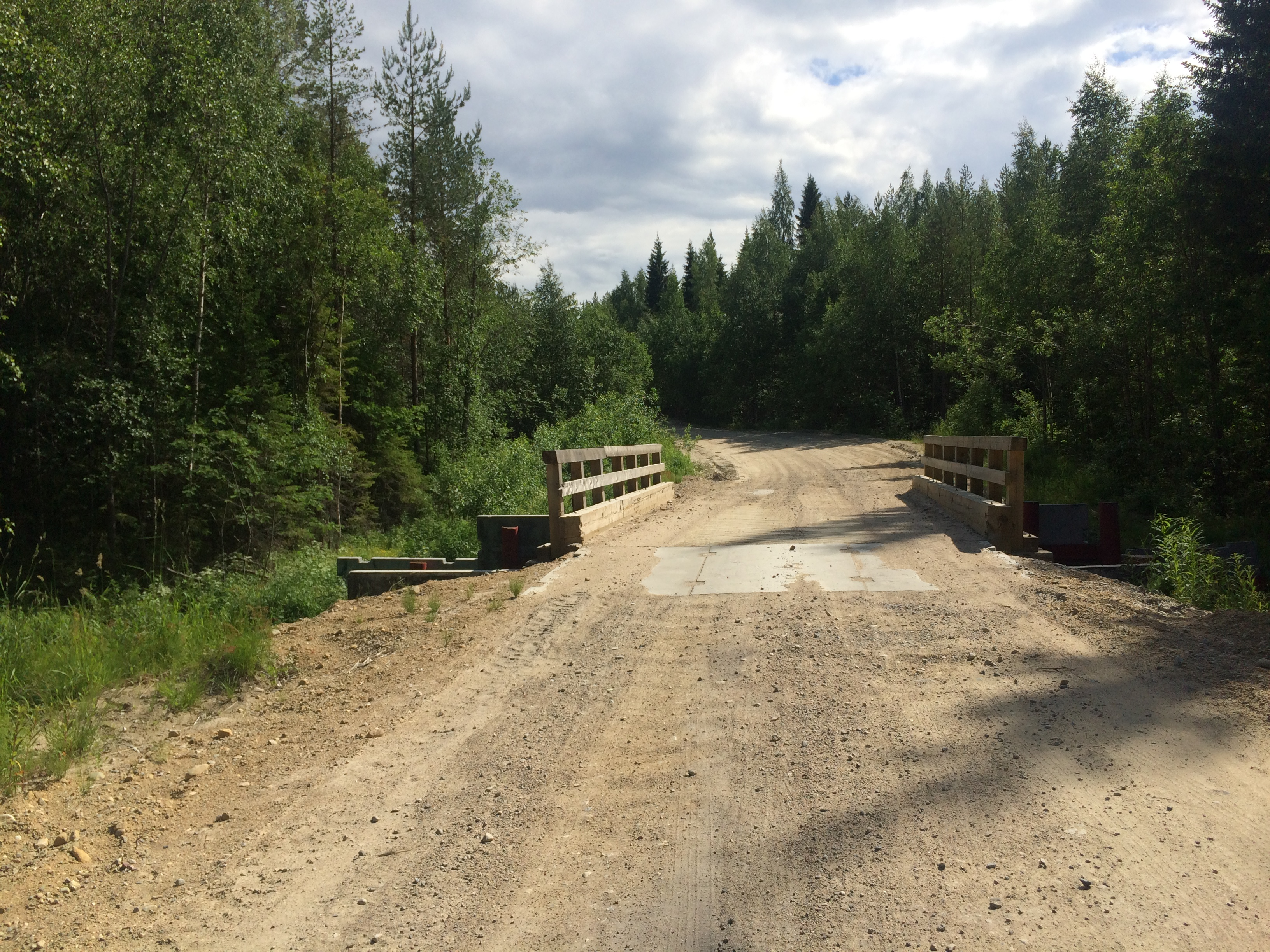 Саморека (река)